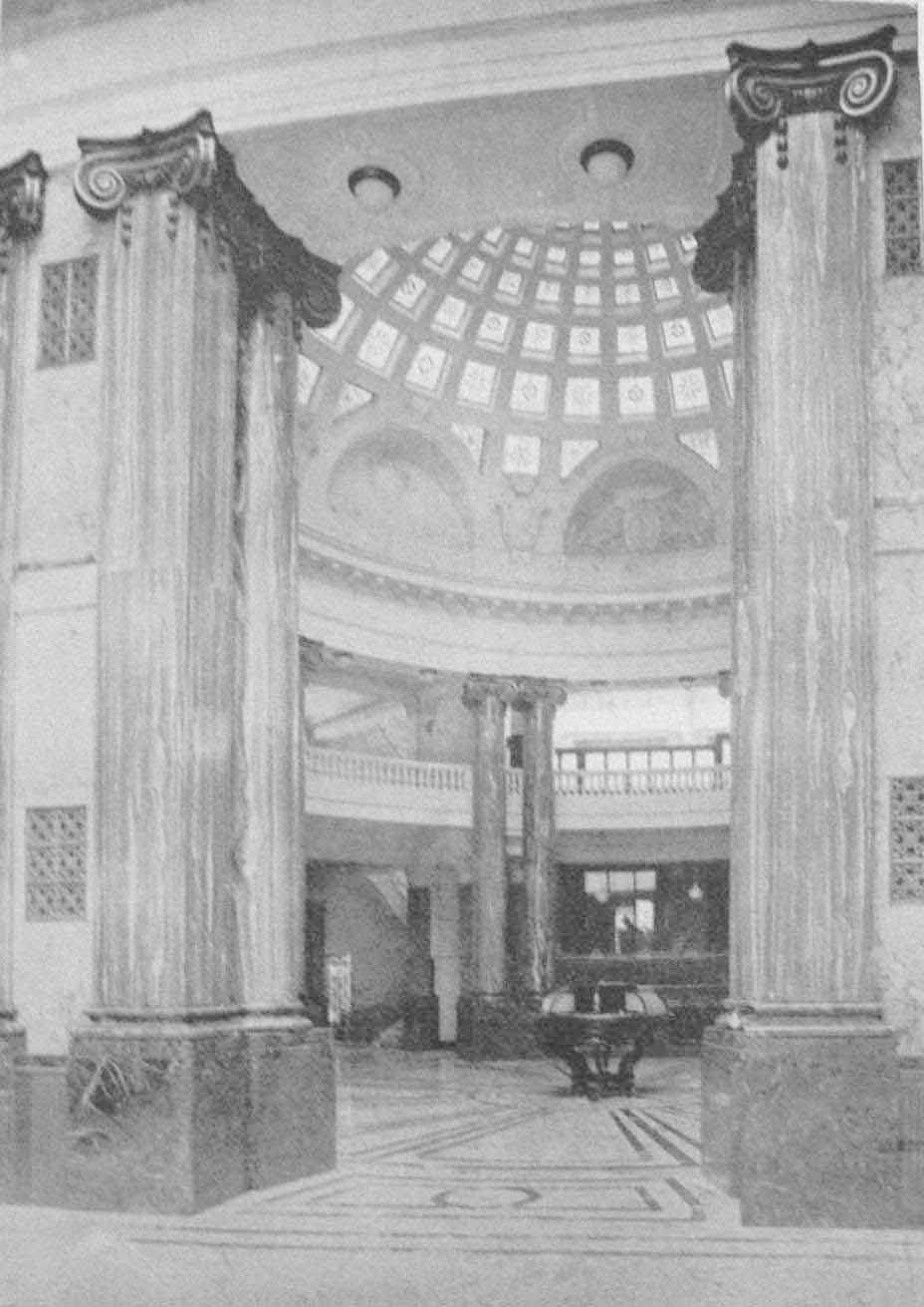 Vista desde el hall de acceso a la rotonda central del edificio del Banco Francés del Río de la Plata (hoy BBVA Banco Francés), en la esquina de las calles Reconquista y Juan D. Perón. Barrio de San Nicolás, ciudad de Buenos Aires, Argentina.